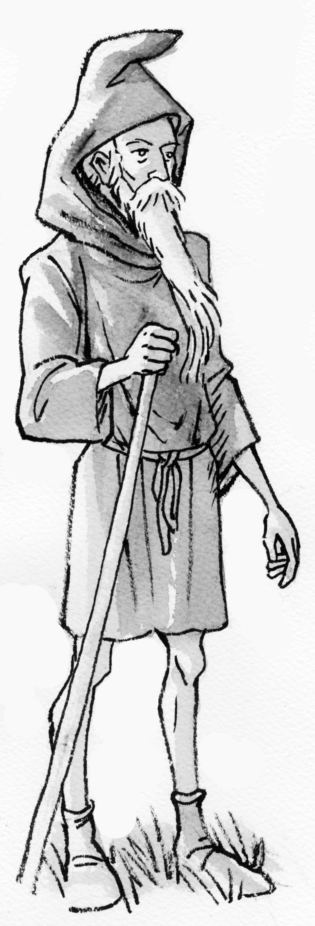 Tantugou, personnage mythique des Pyrénées